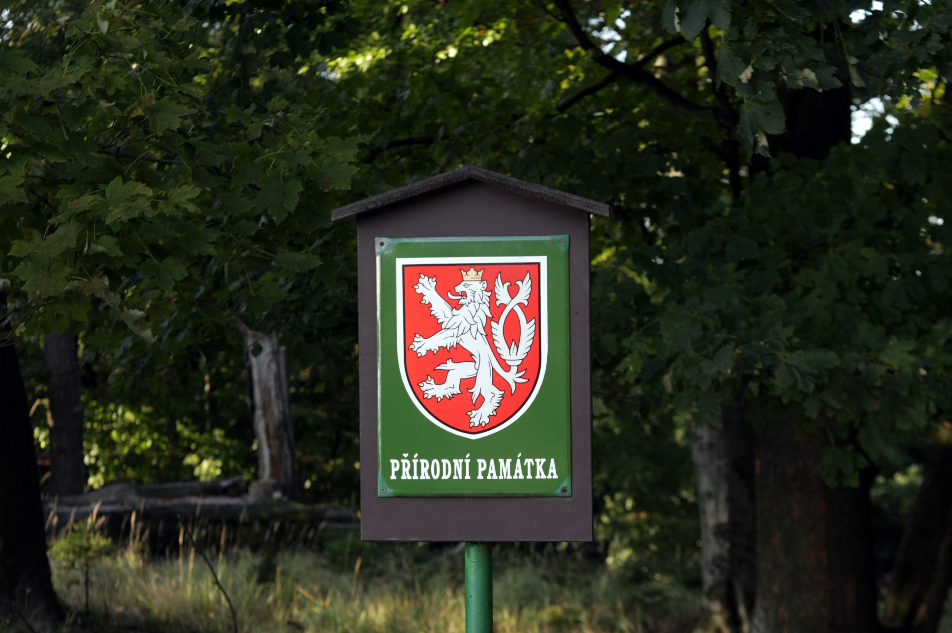 přírodní památka